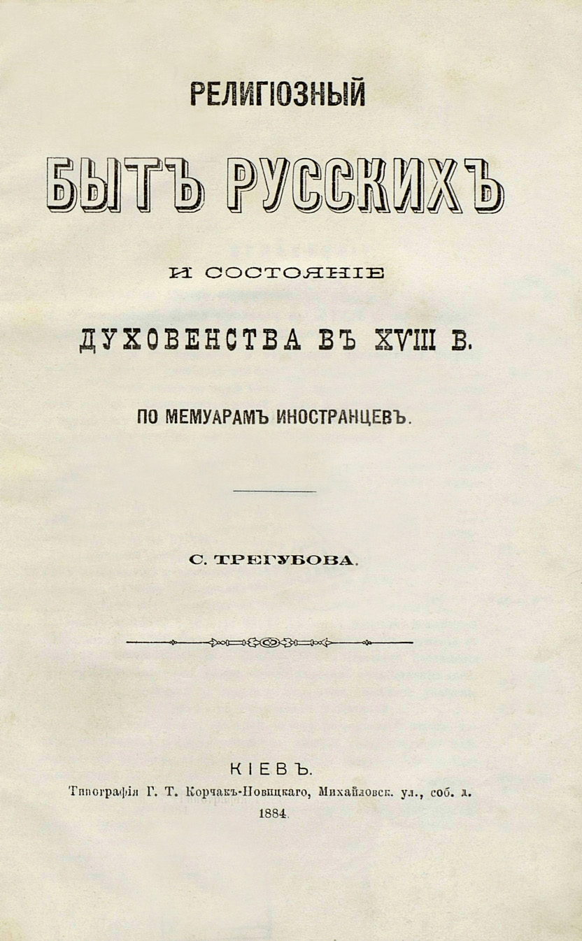 Титульный лист сочинения С. И. Трегубова «Религиозный быт русских и состояние духовенства в XVIII в. по мемуарам иностранцев».